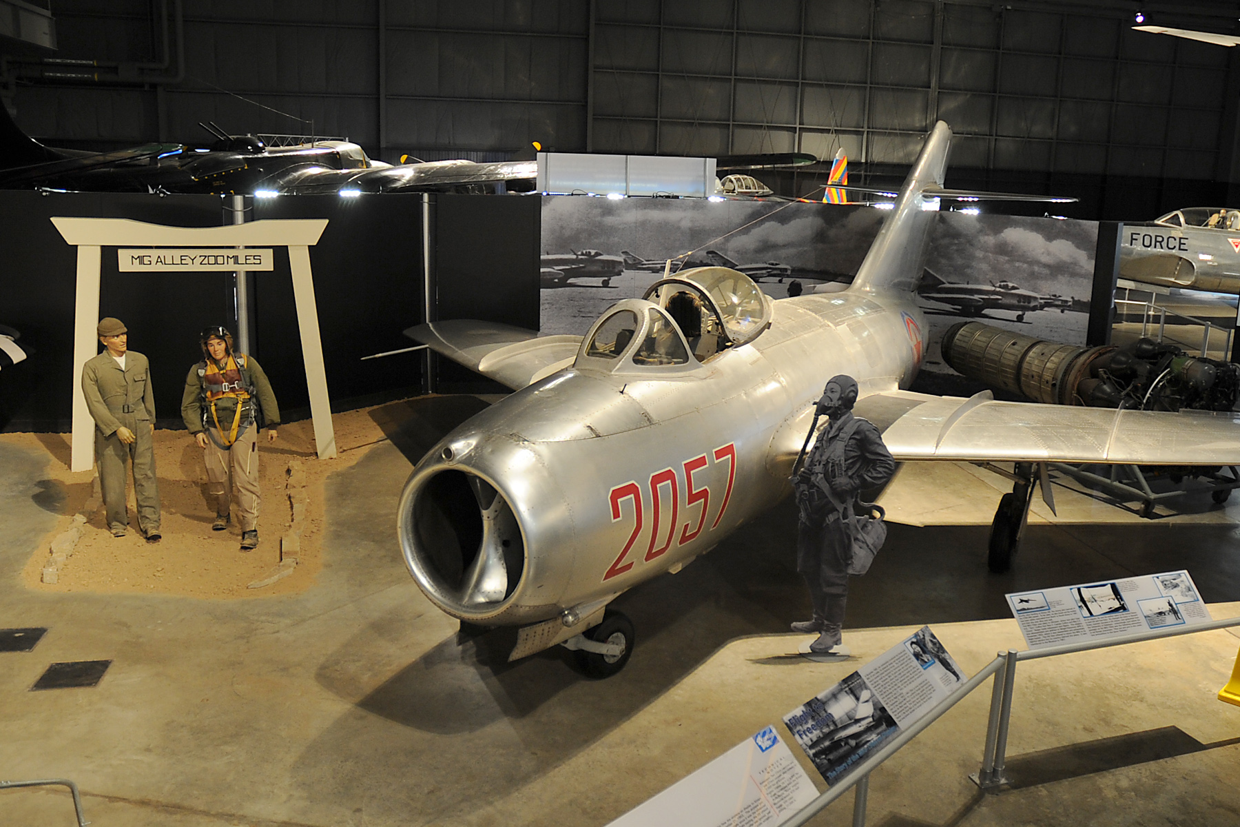 Le MiG-15bis du Lieutenant No Kum-sok, qui a fait défection pendant la guerre de Corée le 21 septembre 1953, passant de la Corée du Nord communiste à la Corée du Sud, soutenue par les forces de l'OTAN. L'avion est actuellement exposé au National Museum of the United States Air Force (NMUSAF), sur la base aérienne de Wright-Patterson, près de Dayton, dans l'Ohio (USA) (Crédit : US Air Force)